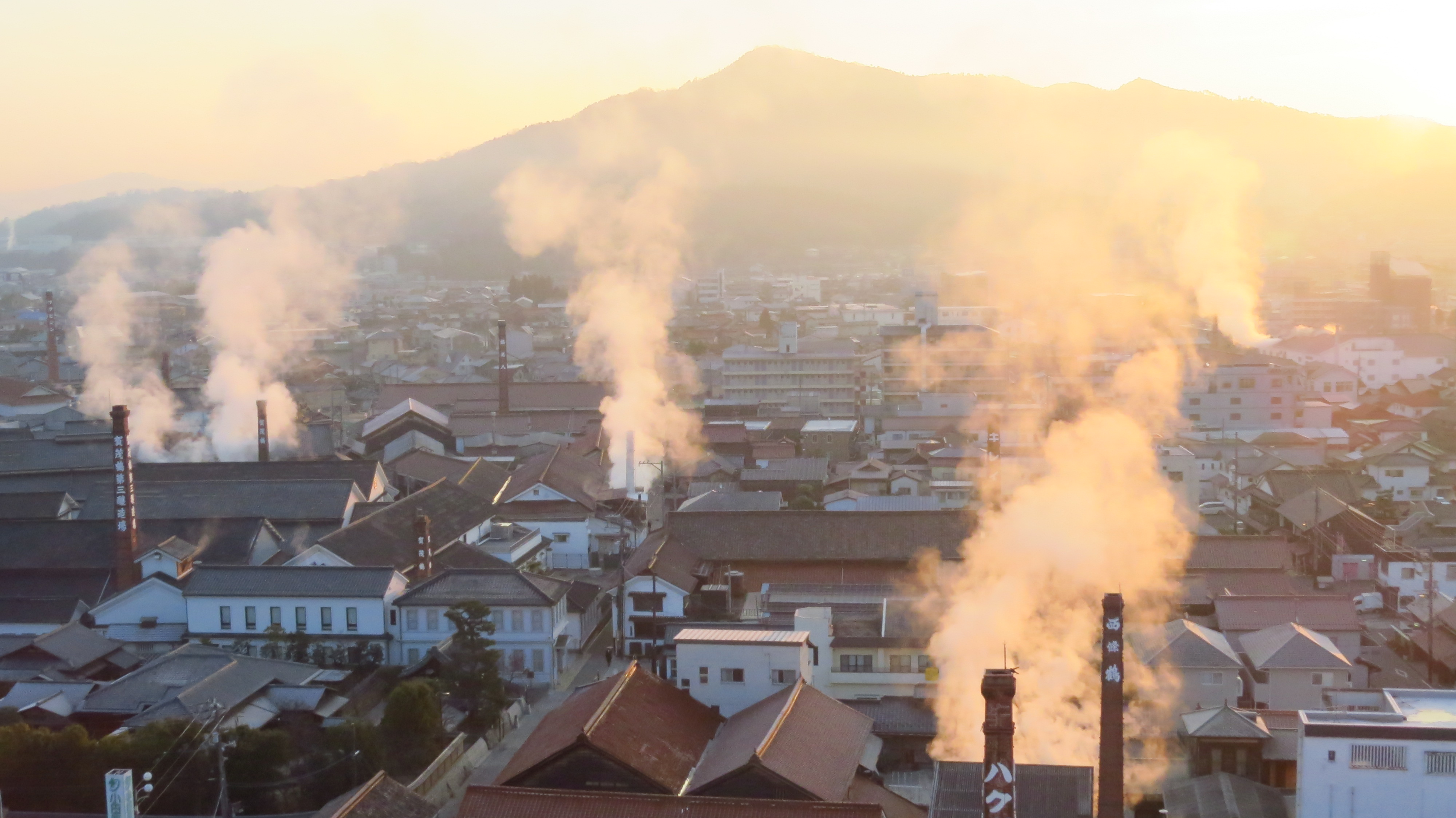 夜明け（西条町、2014年1月）